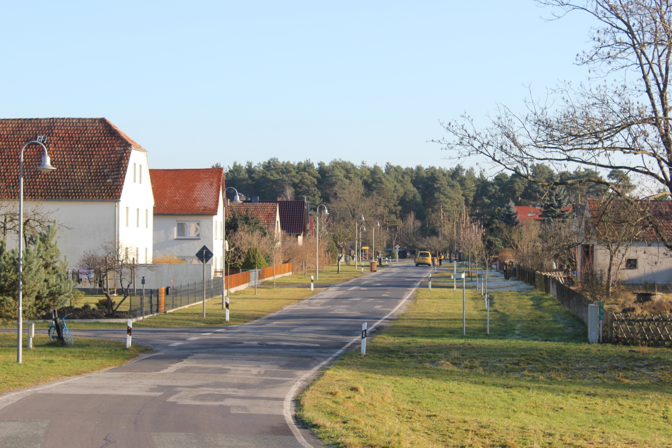 Hornjoserbsce: Kisličanska dróha w Połpicy (gmejna Malešecy).